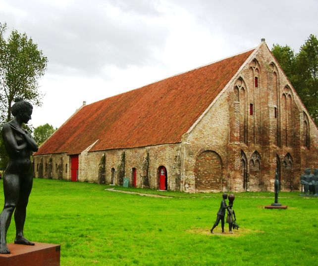 Abij Ter Doest - eigen foto